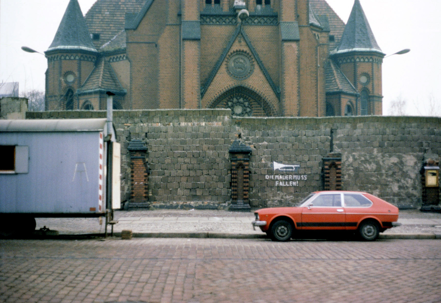 Berlin, Bernauer Straße, Versöhnungskirche, 12. Januar 1978